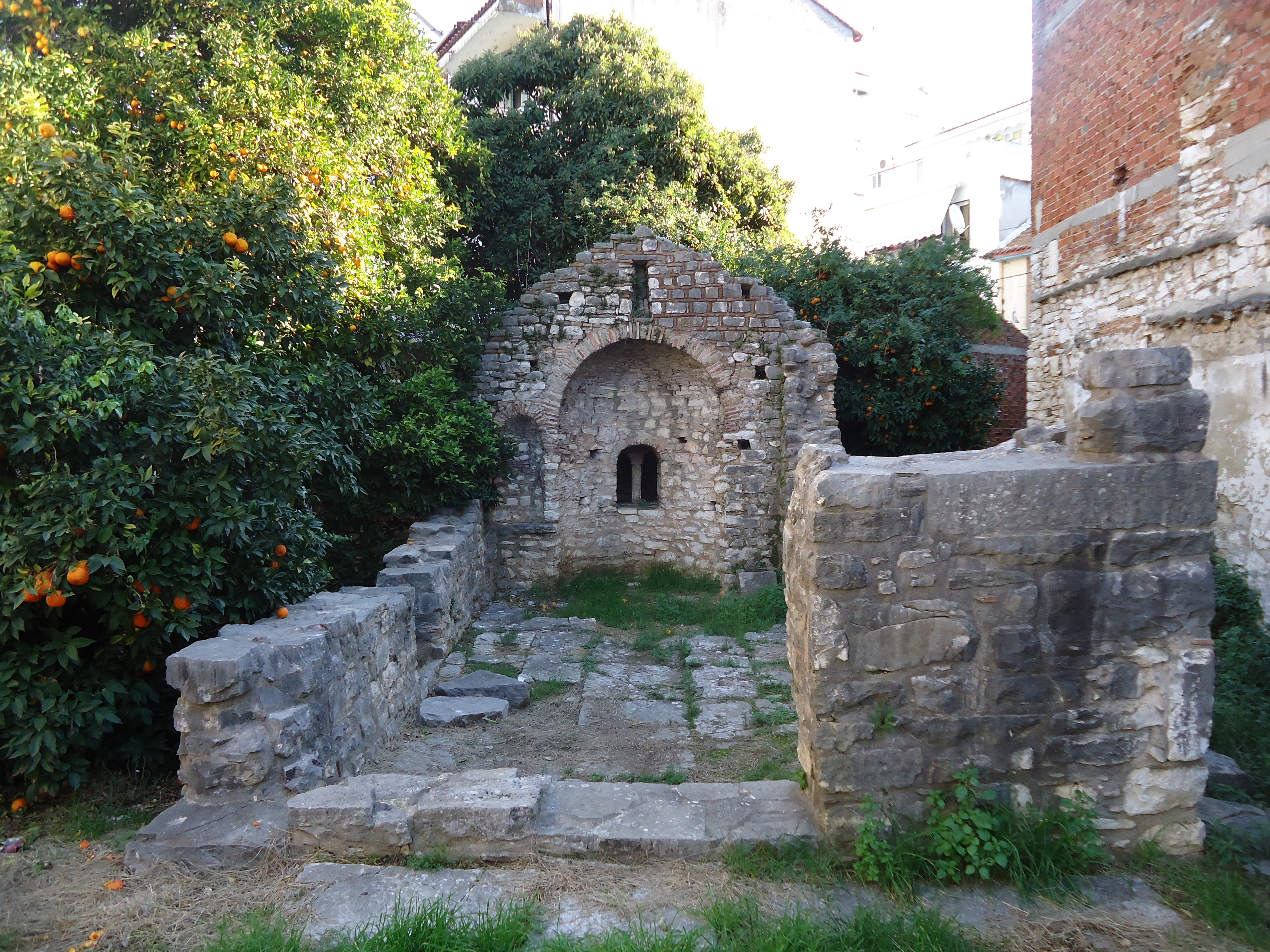 Κατεστραμμένος ναΐσκος του τέλους της Βυζαντινής περιόδου (14ος ή 15ος αιώνας) δίπλα στην περιοχή της λαϊκής αγοράς, κοντά στον Άγιο Βασίλειο.